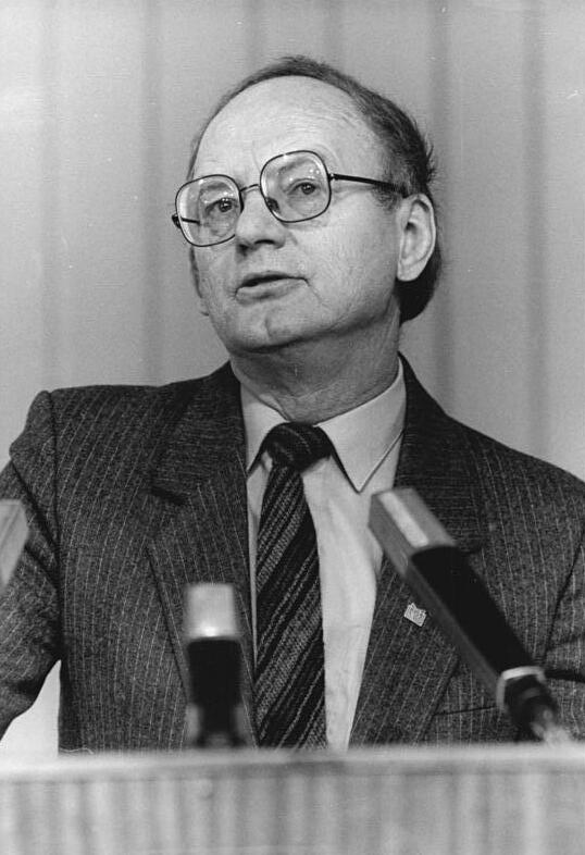 ADN-ZB Mittelstädt 24.11.87 Berlin: X. Schriftstellerkongreß. Hermann Kant, Präsident des Schriftstellerverbandes der DDR, bei seinem Referat an die Kongreßteilnehmer in der Kongreßhalle am Alexanderplatz.